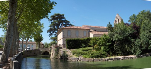 mare et place du village